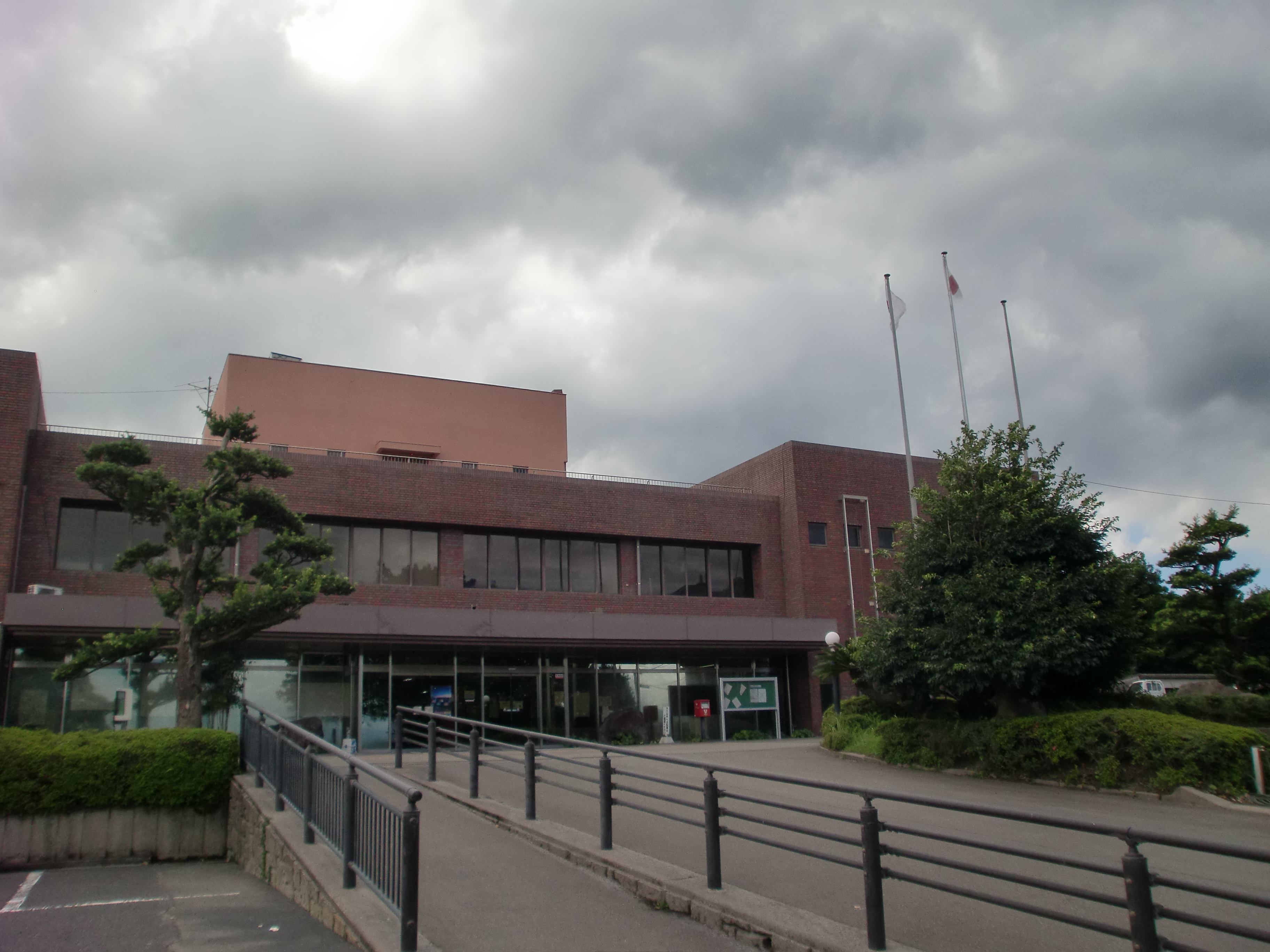 鹿児島市役所桜島支所（旧：桜島町役場）の外観。